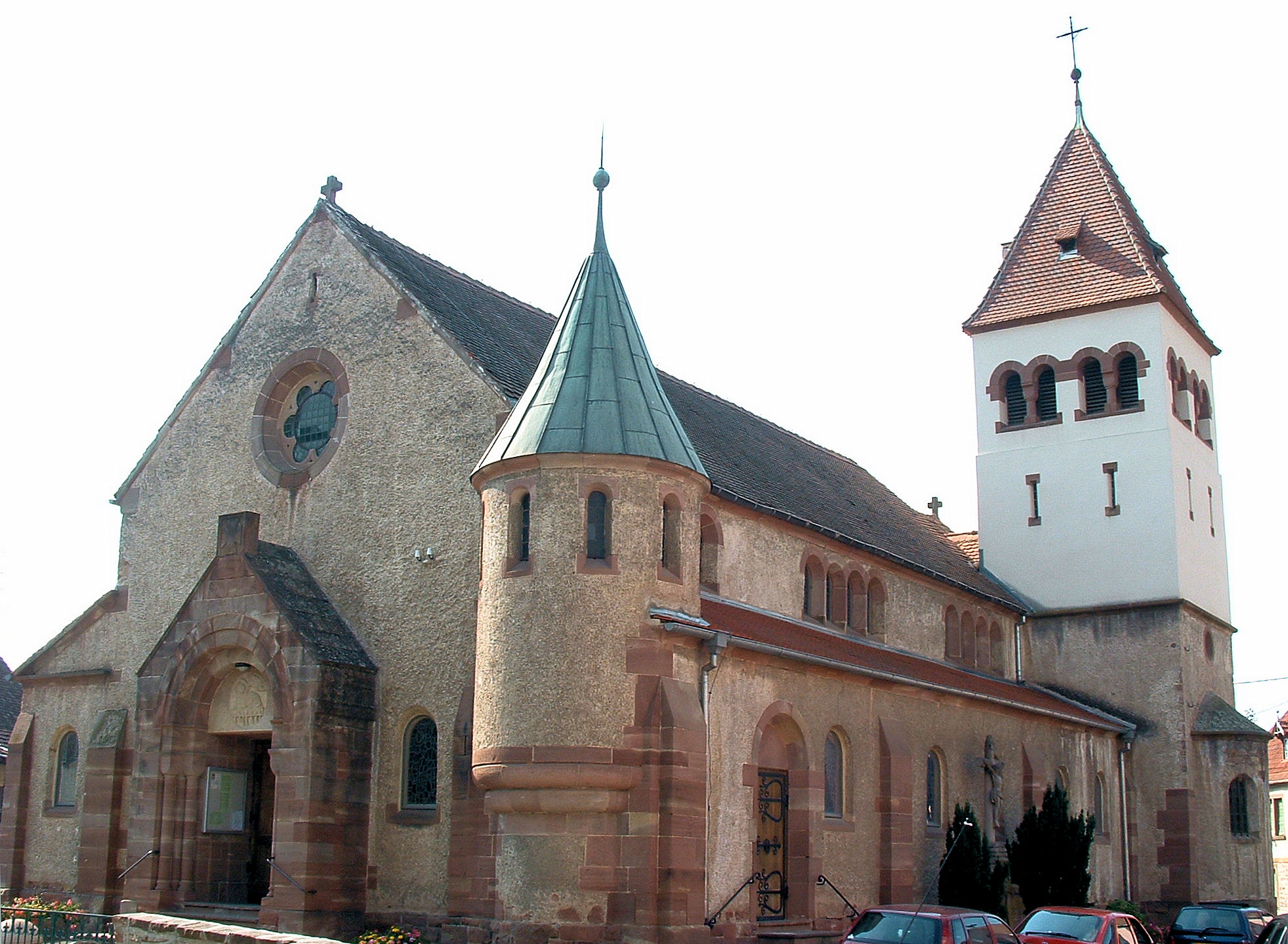 Avolsheim - Eglise Saint-Materne -1